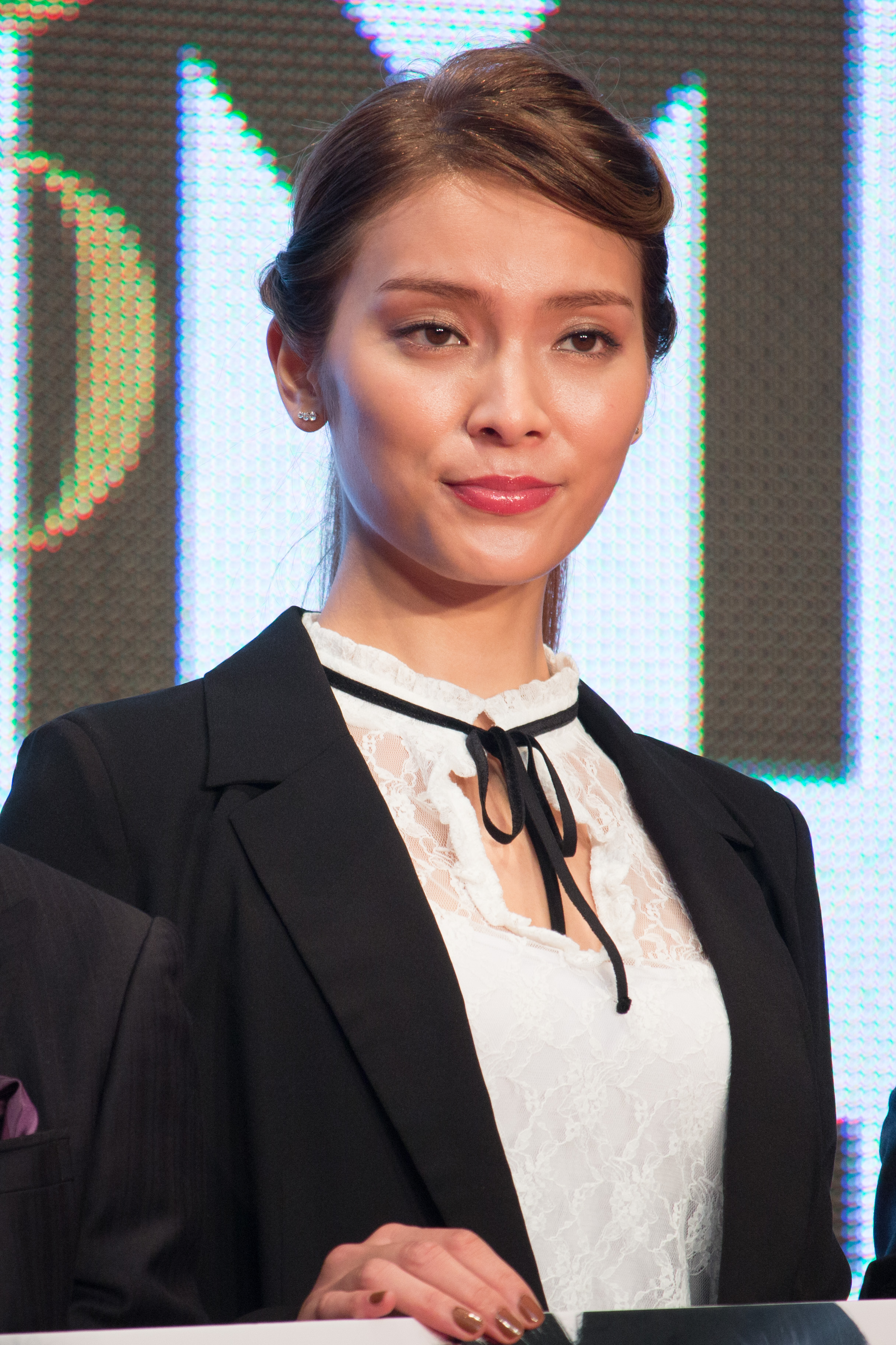 第28回 東京国際映画祭 オープニングセレモニー 秋元才加 (媚空-ビクウ-)